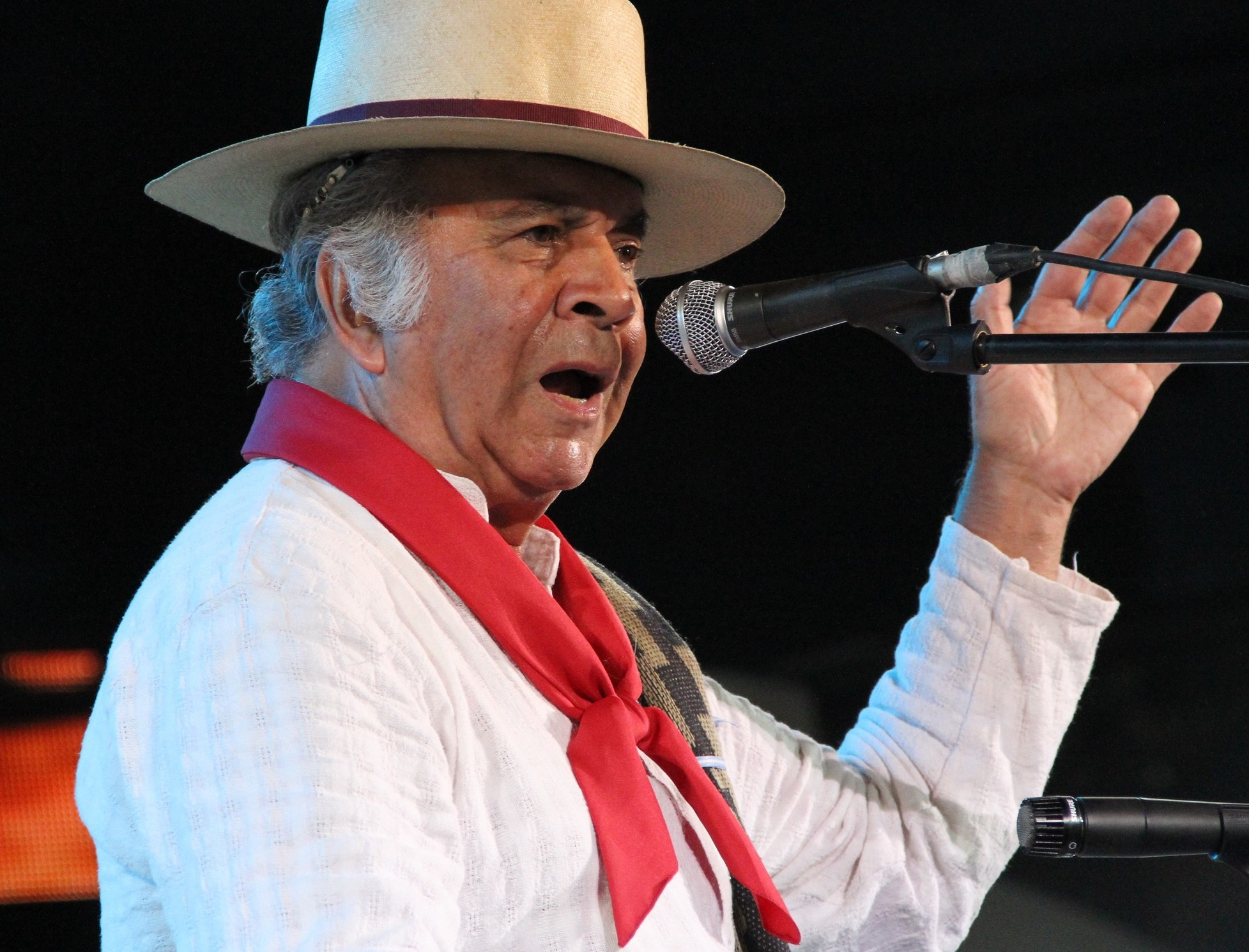 Omar Moreno Palacios. Fotografía tomada en el Festival de Cosquín, el 23 de enero de 2013. (He rotado horizontalmente la foto, para que el sujeto quede mirando hacia la izquierda. También he borrado la leyenda "Cosquín 2013").